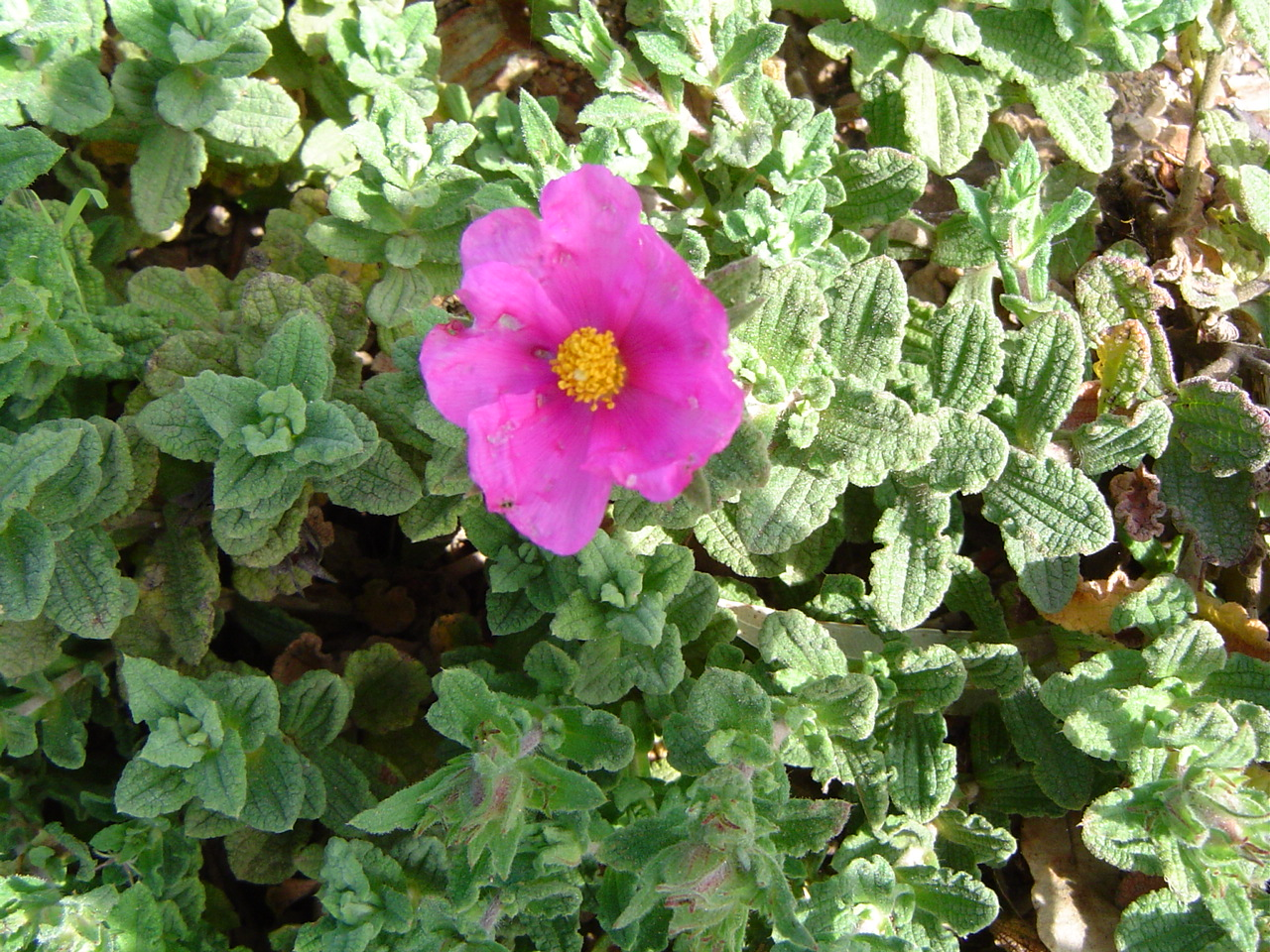 Cistus crispus, Ceuta, NW de África, España